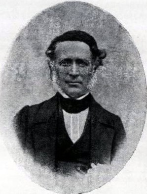 Portrett av Gabriel Kirsebom Kielland